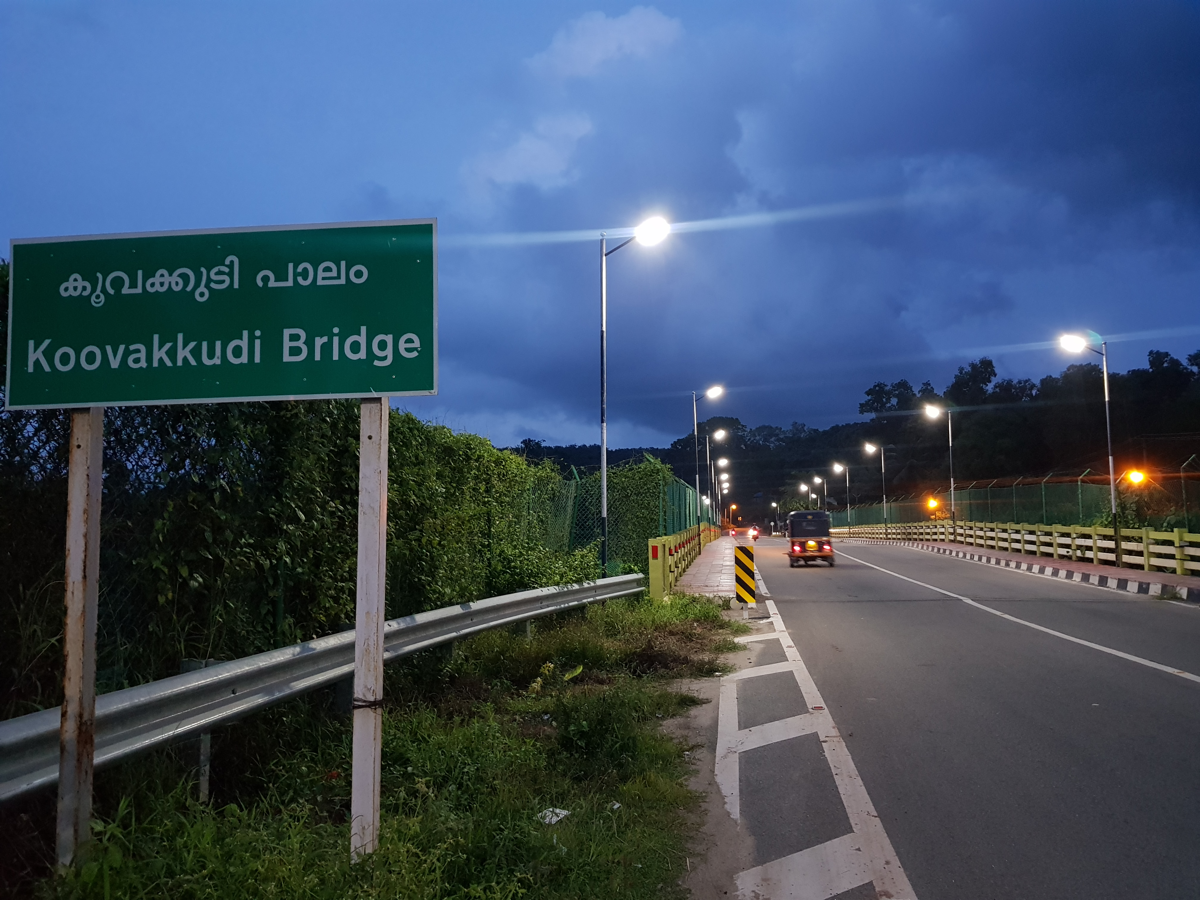 രാത്രി കാഴ്ച